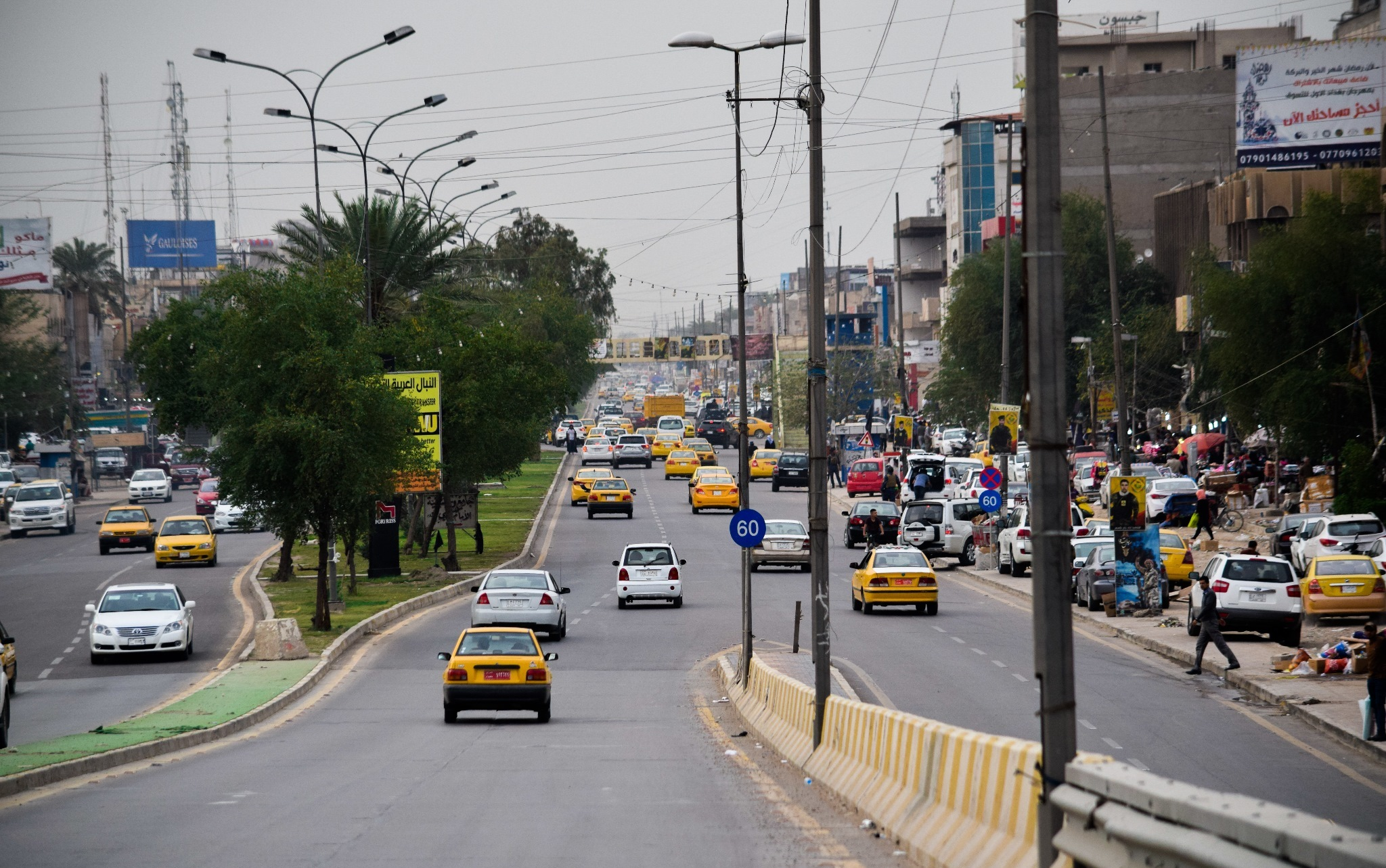 صورة لشارع فلسطين بعدسة المصور احمد محمد